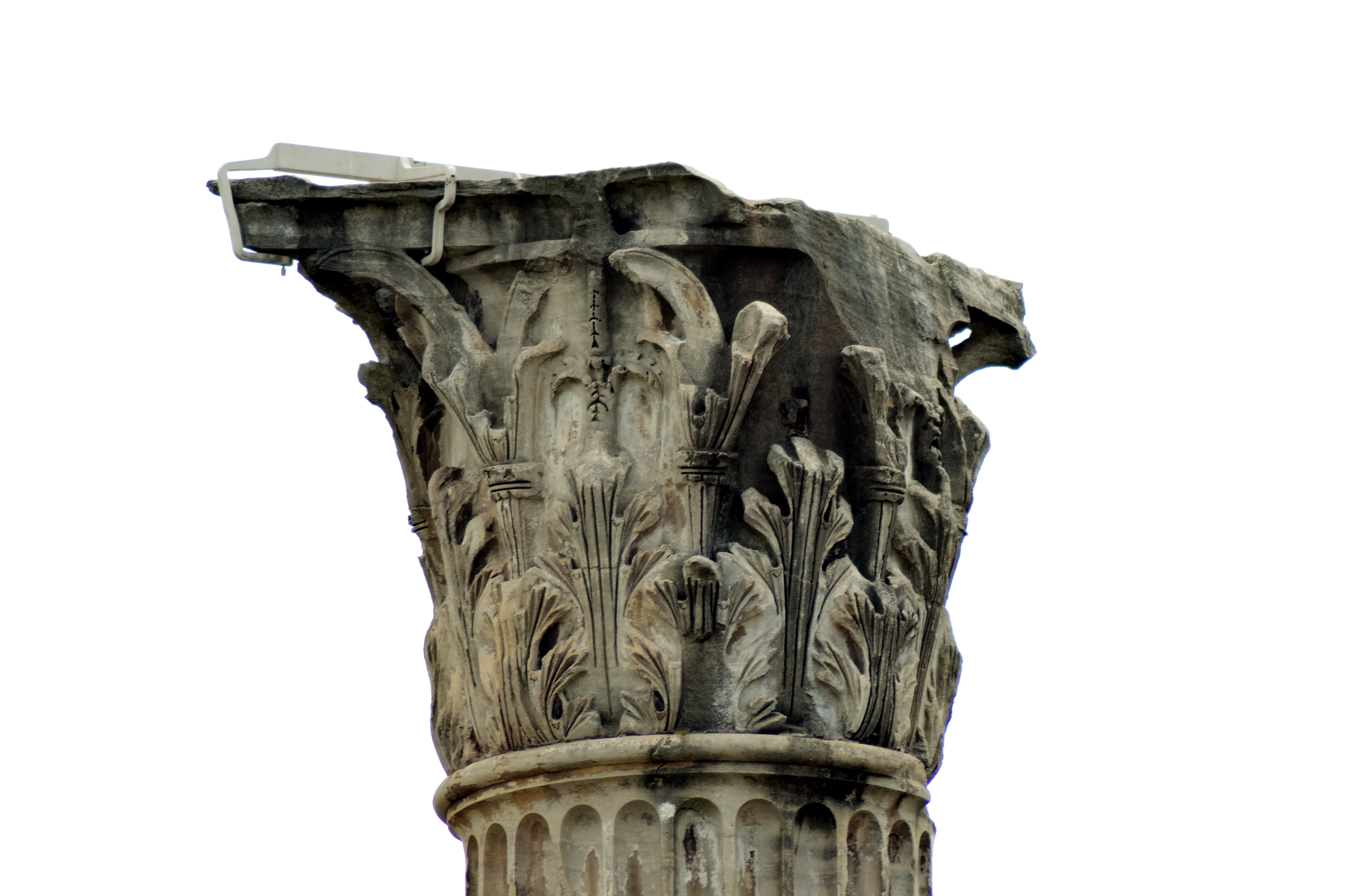 Korinthisches Kapitell der Phokas-Säule